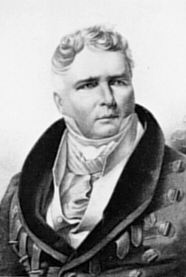 Anton Fuerst Radizwill (1775-1833) Lithographie von Faustino Anderloni nach Zeichnung von Wilhelm Hensel. Er kleidete seit 1815 den Statthalterposten im Großherzogtum Posen und war Mitglied des preußischen Staatsrates. Neben seiner beruflichen Tätigkeit trieb er mit Vorliebe Mathematik und Musik. Er war ein vortrefflicher Tenor, spielte meisterhaft das Vilioncell und schuf außerordentliche Kompositionen. Sein bedeutendstes kompositorisches Werk ist die Musik zu Goethes "Faust", die den Komponisten bis zu seinem Tode beschäftigte. Bereits am 24.Mai 1820 waren die fertiggestellten Teile in Gegenwart des ganzen Hofes aufgeführt worden.